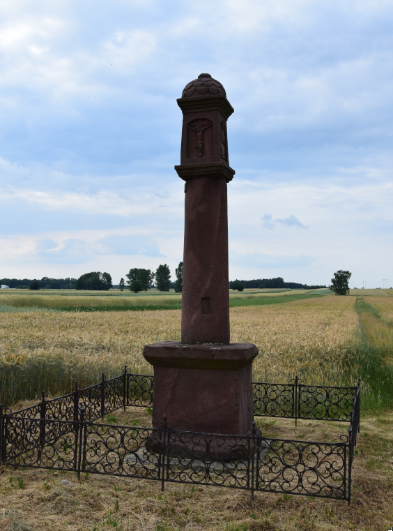 Sycyna obelisk Kochanowskich z 1621 roku.